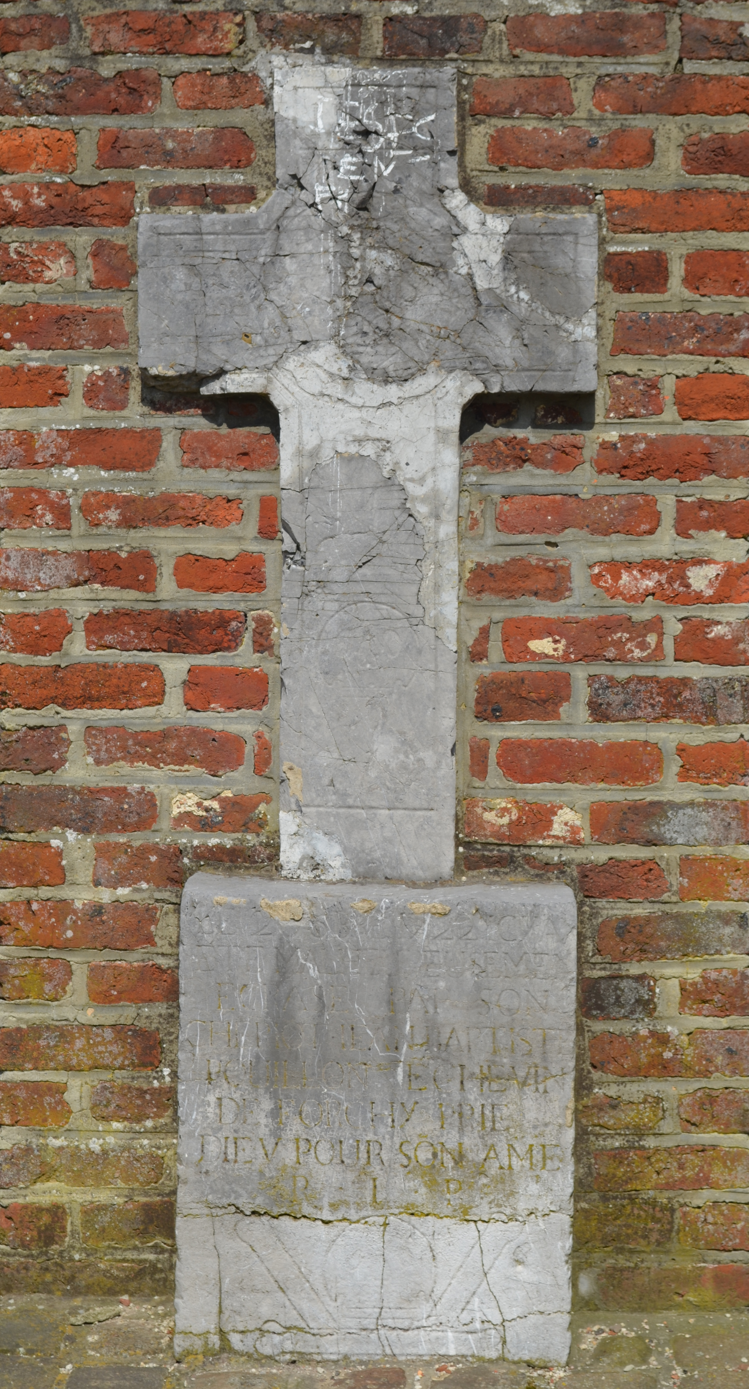 Jumet (Charleroi) - Croix d'occis dites Croix Pouillon. Elle se dressait autrefois au fond de la rue de Mons, avant d'être déplacée au chevet de la chapelle Notre-Dame de Heigne et finalement être installée à son emplacement actuel le 8 juin 1991. Inscription : « LE 26 8BRE 1722 ICY A ETE MALHEUREUSEMEN ECRASE PAR SON CHERIOT IEAN BAPTISTE POUILLON ECHEVIN DE FORCHY - PRIE DIEU POUR SON AME - RIP ».